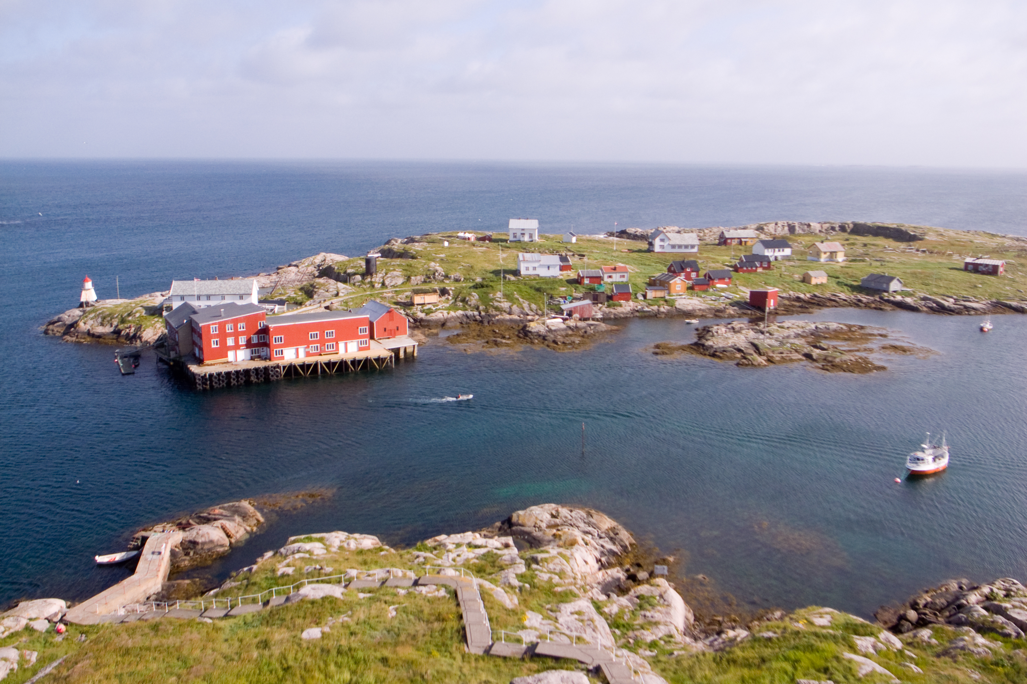 Halten in Frøya